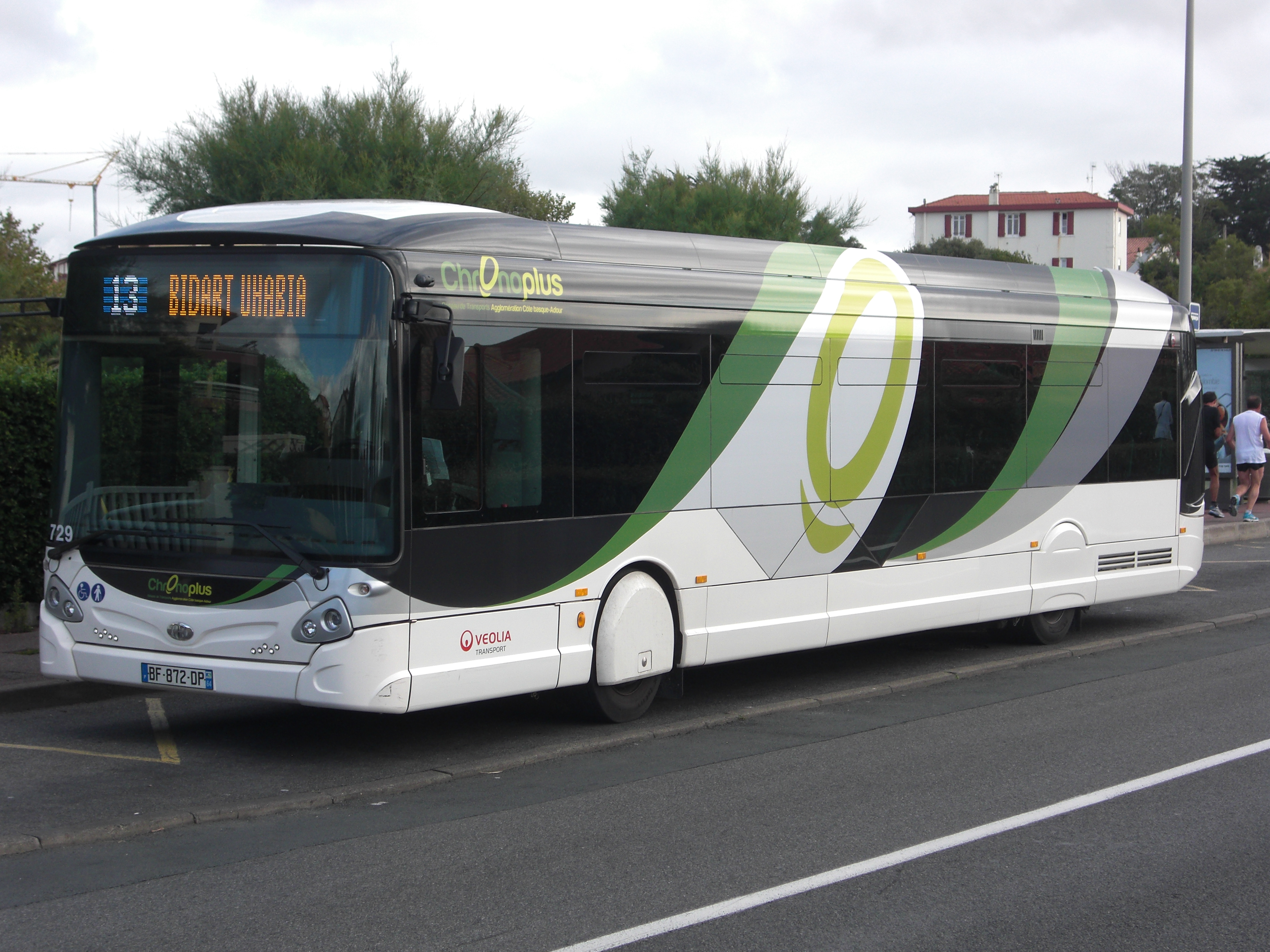 Photo d'un bus du réseau Chronoplus sur la ligne 13 au terminus "Anglet Plages".